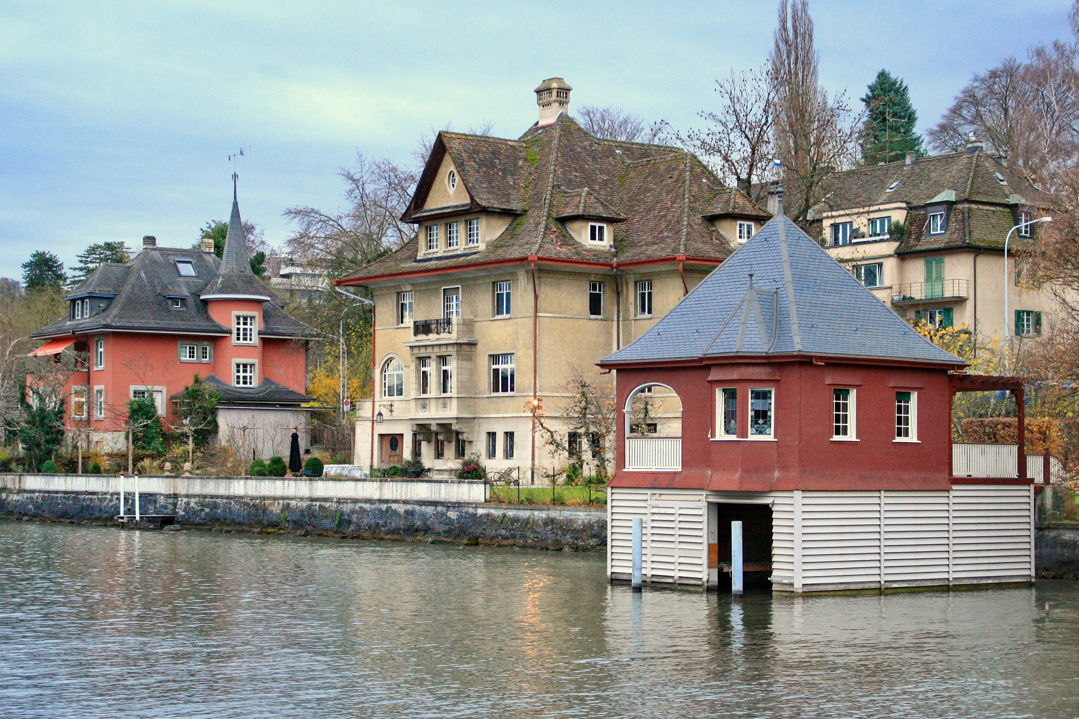 Seestrasse 431 in Zürich-Wollishofen (Switzerland), as seen from Rote Fabrik